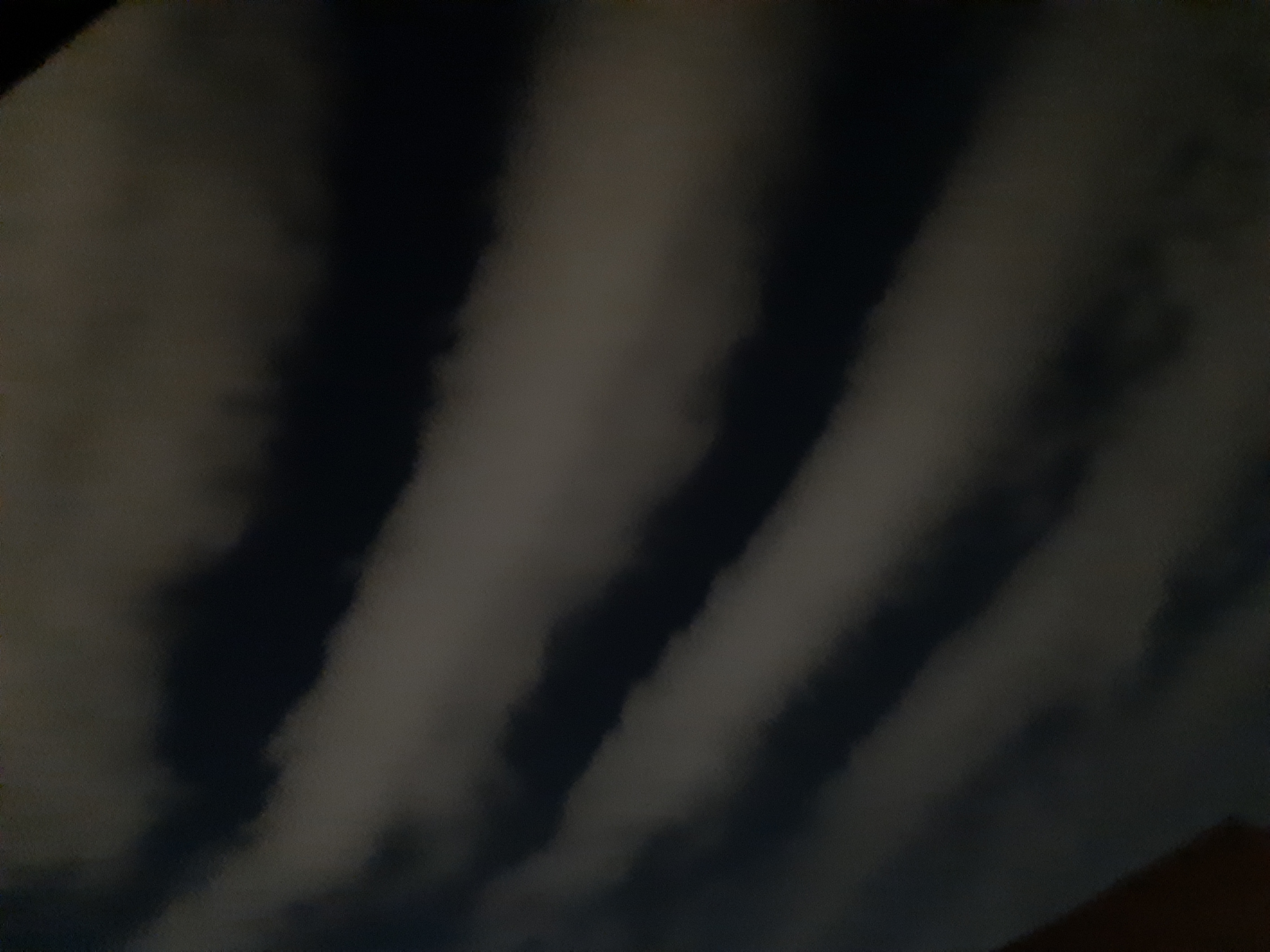 asd